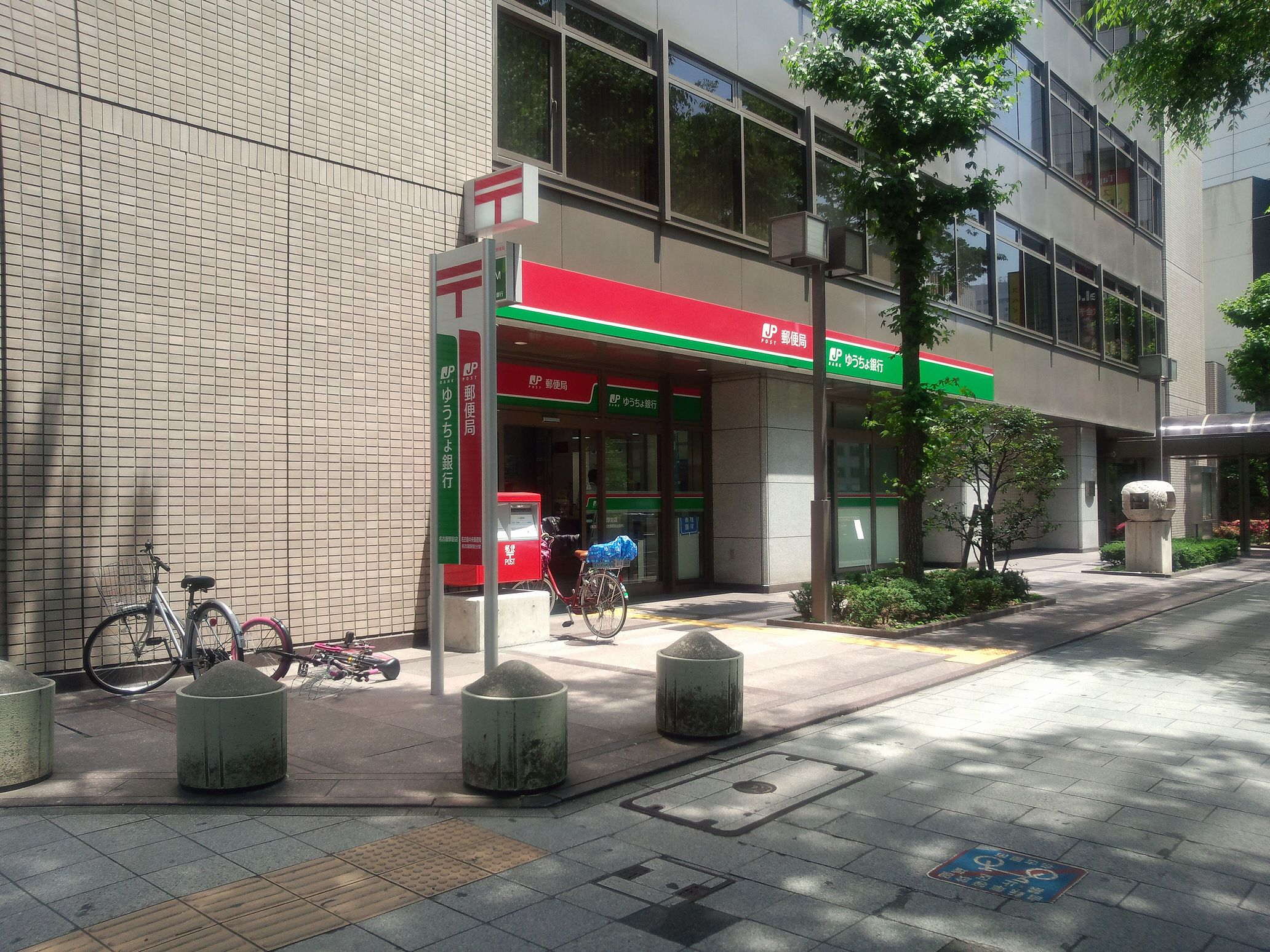 2012年10月9日に移転した名古屋駅前分室